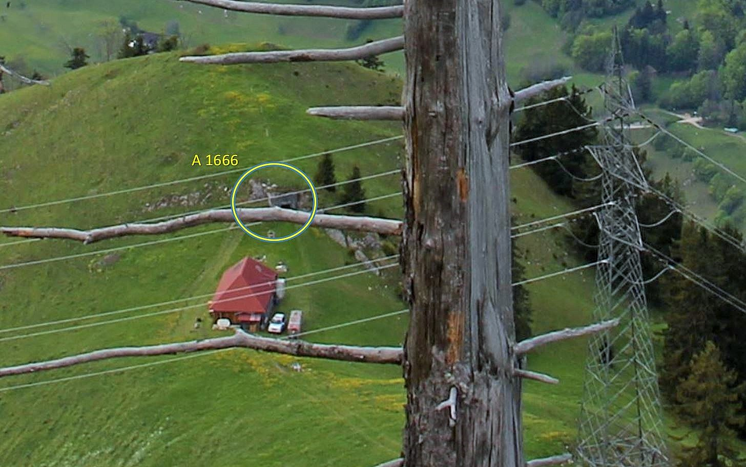 Sperrstelle La Tine VD, Schweiz